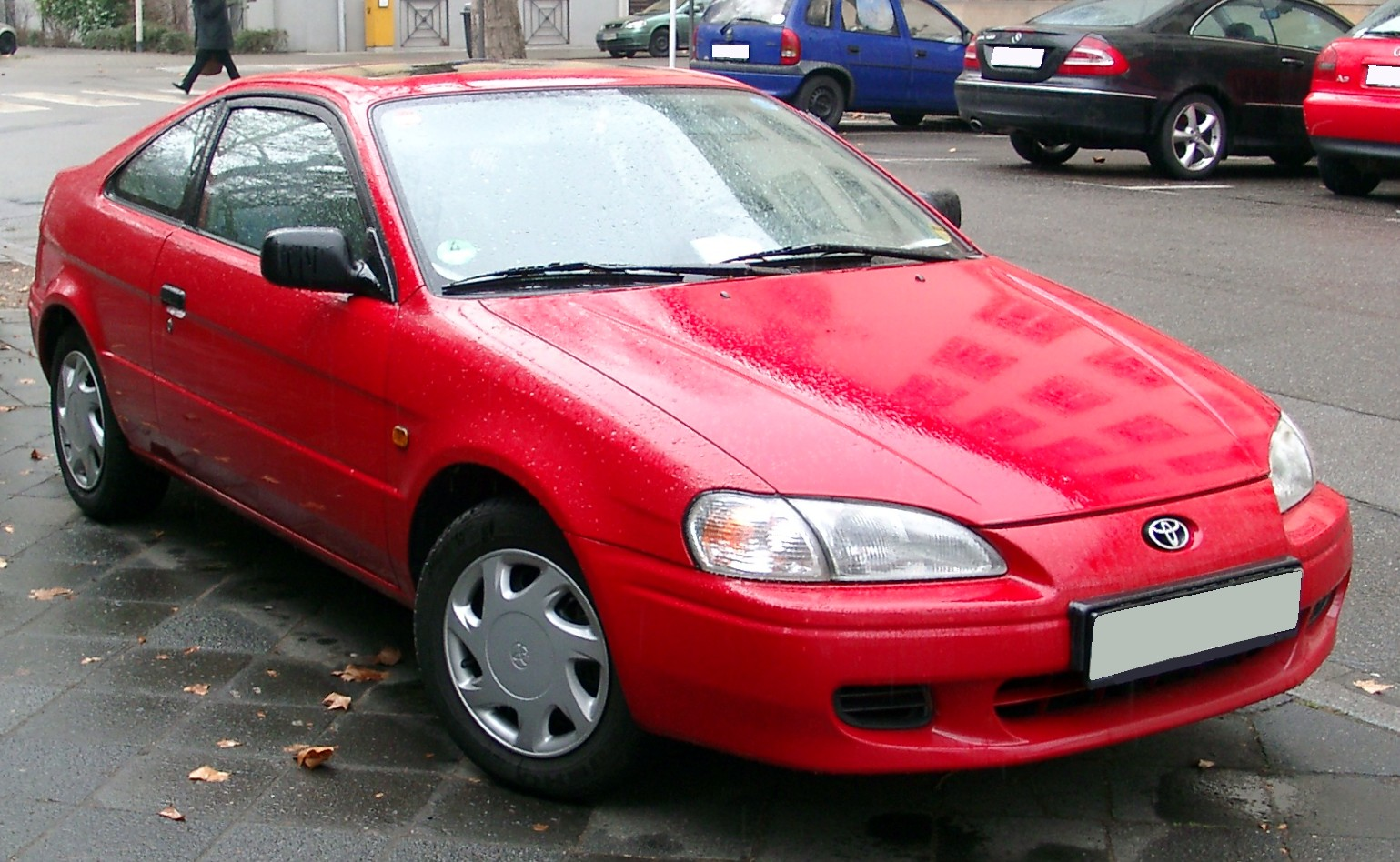 Toyota Paseo